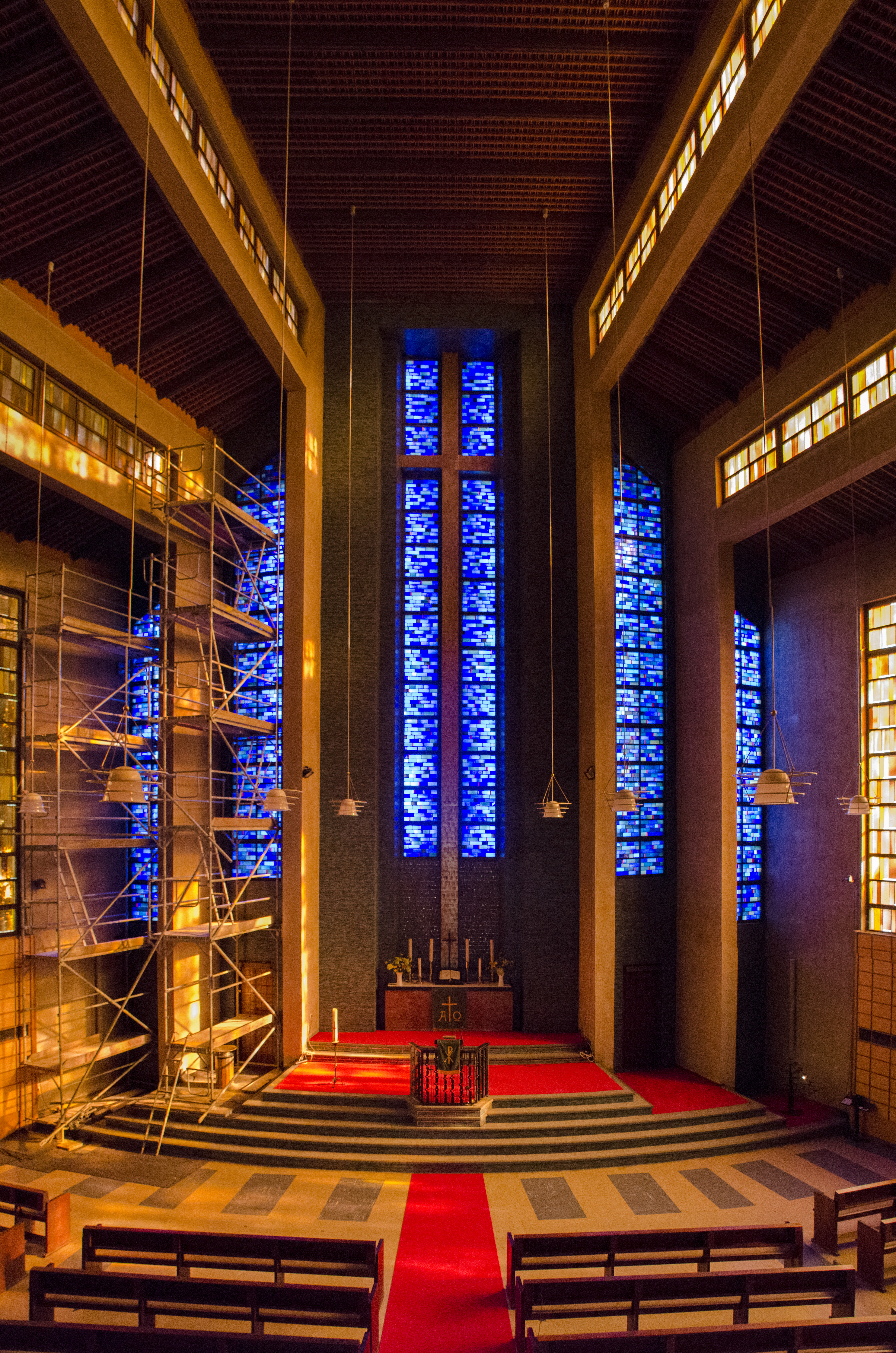 Blick auf den AltarbereichThis is a photograph of an architectural monument.